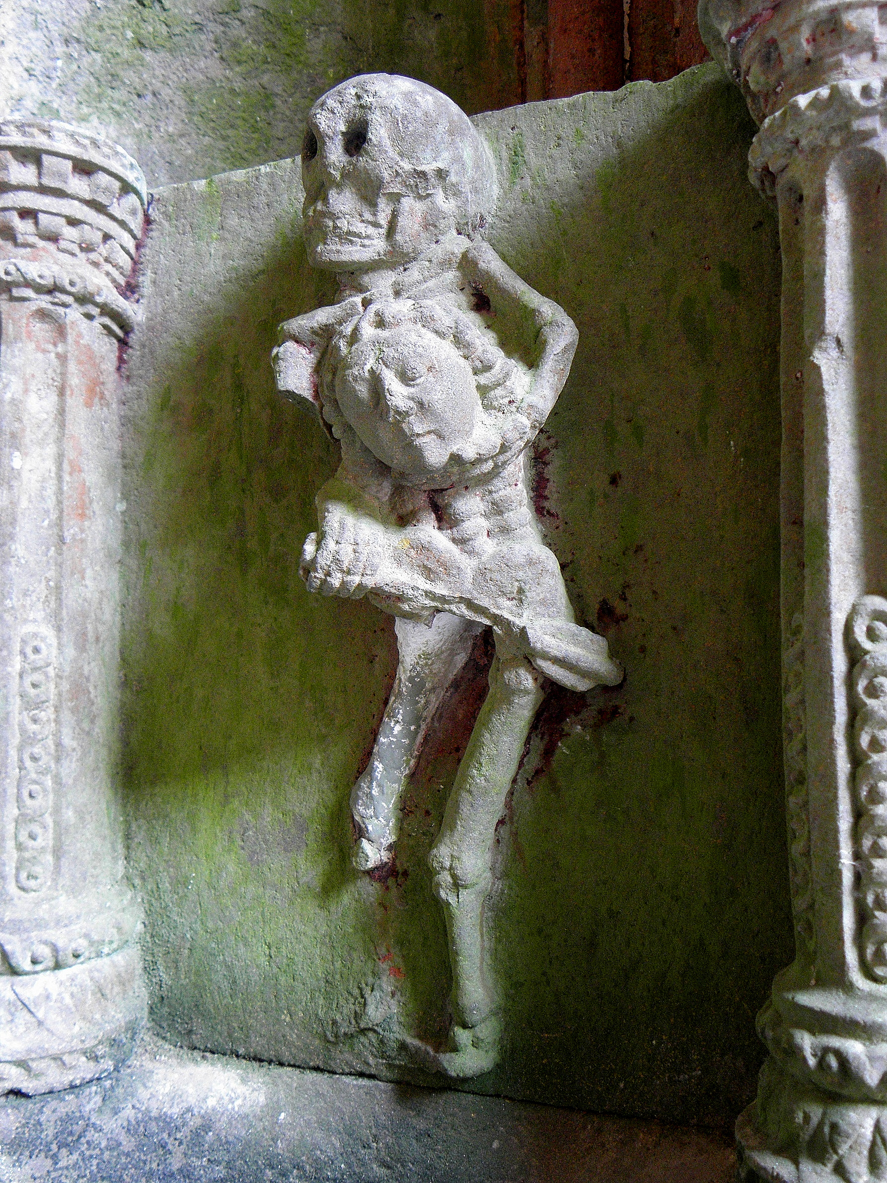 Bénitier à l'Ankou du porche sud de l'église Saint-Salomon de La Martyre (29).